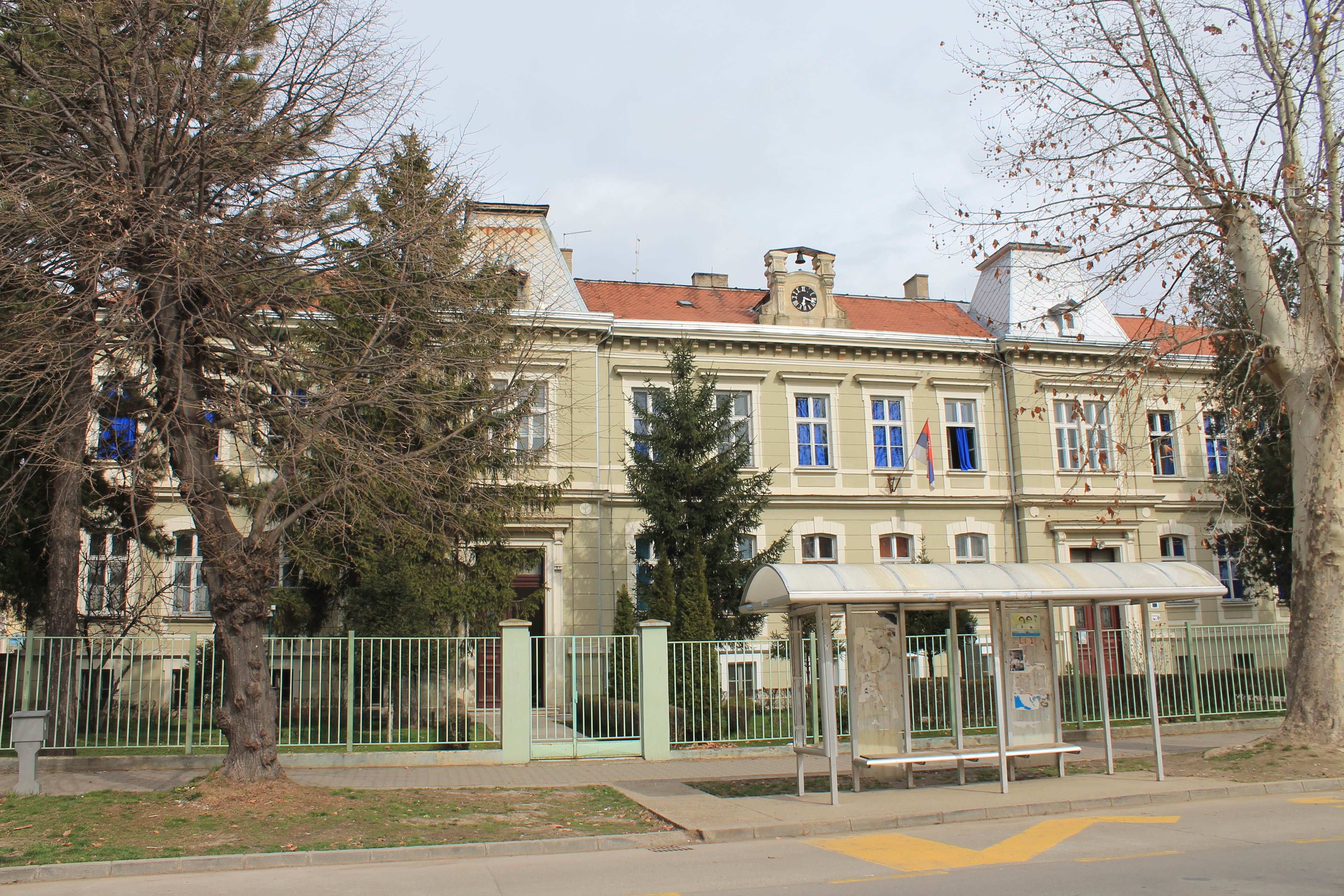 OŠ Veljko Dugošević, Ruma